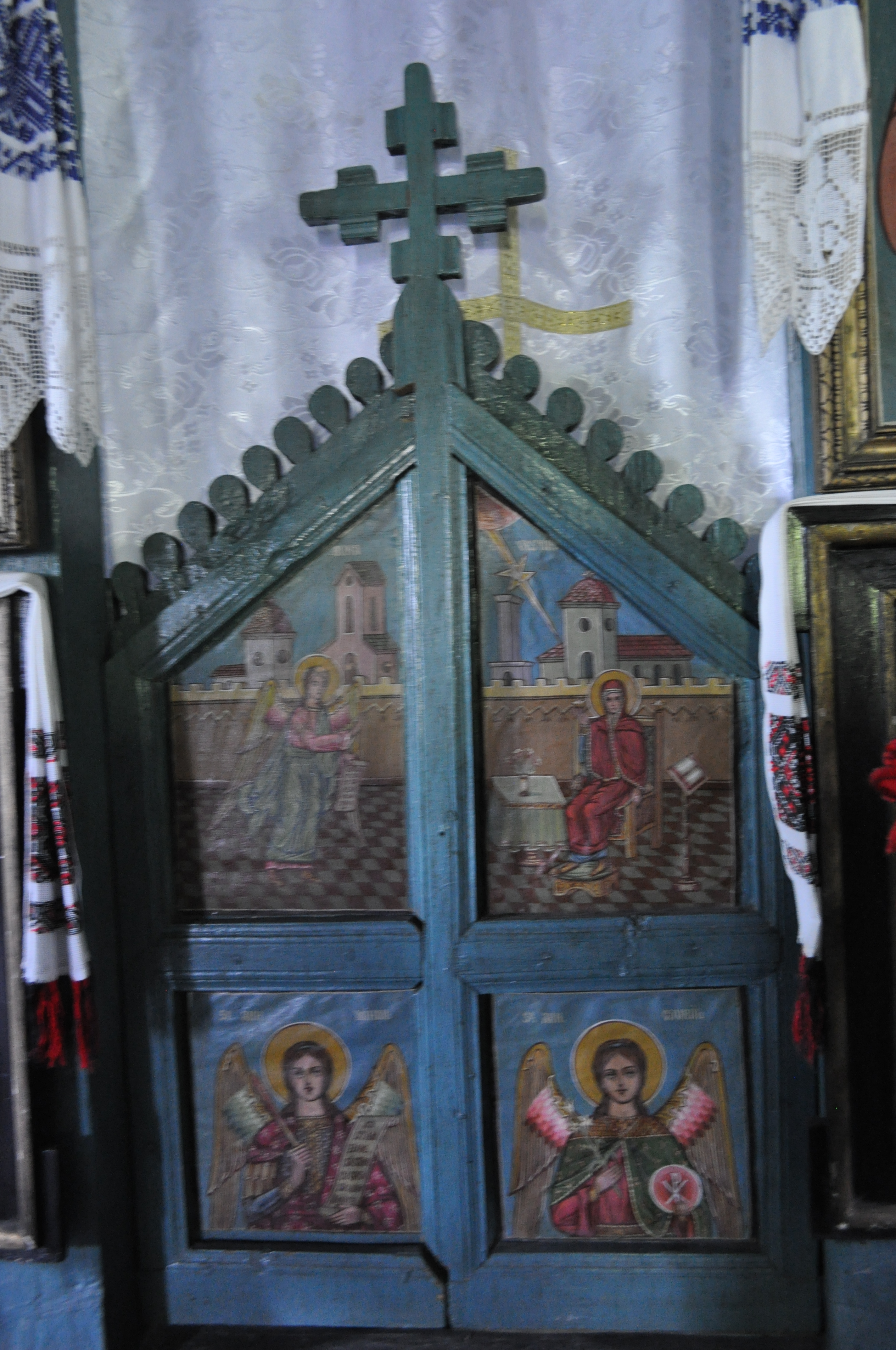 Biserica de lemn din Cojocna, județul Cluj